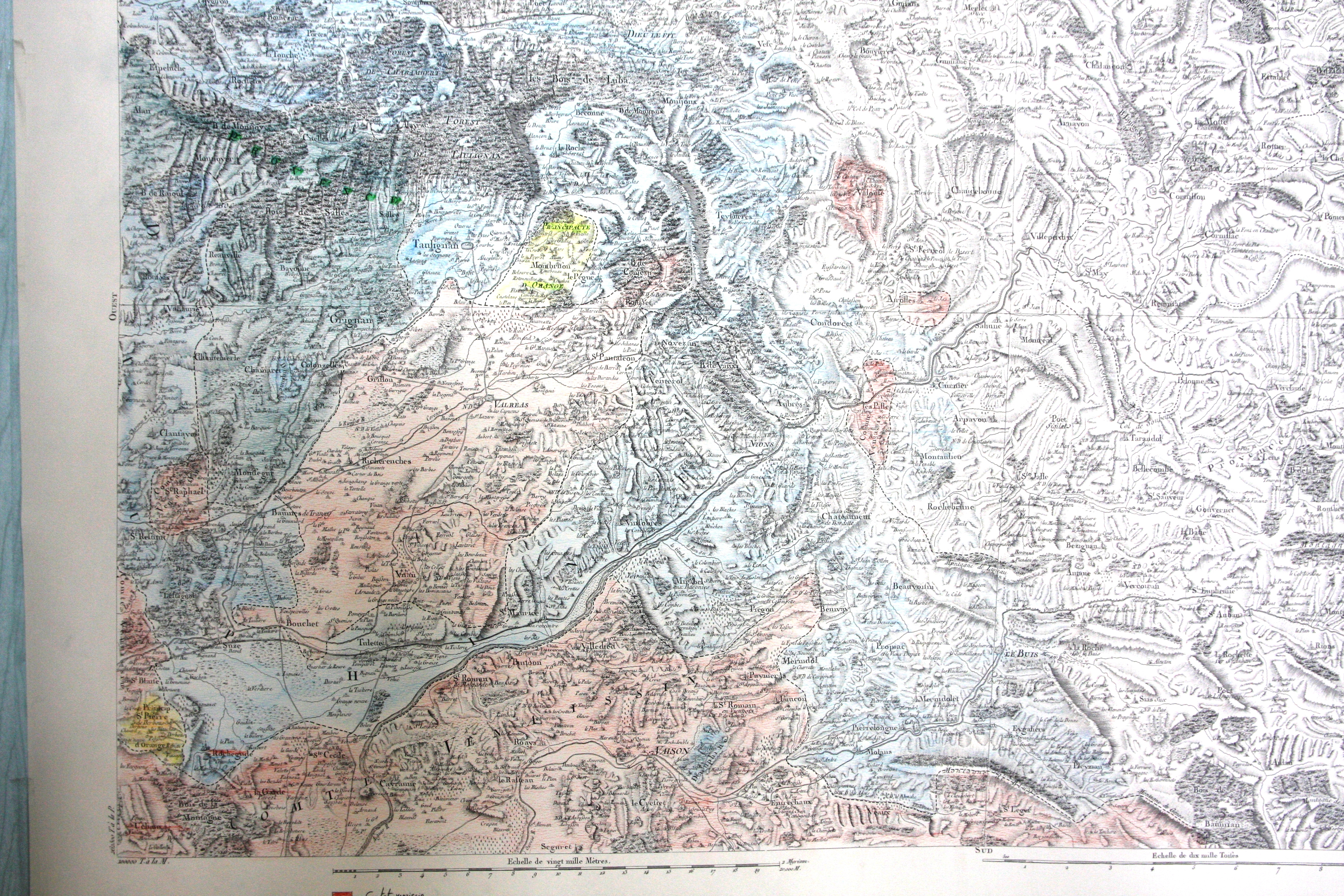 Carte Cassini section 121, coloriée, aggrandissement (environs de 1750)